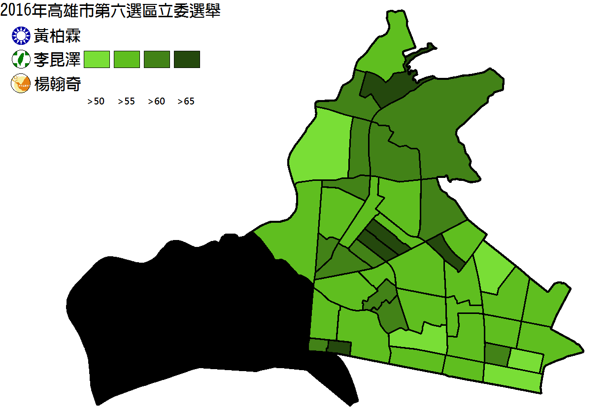 2016年高雄市第六選區立委選舉得票